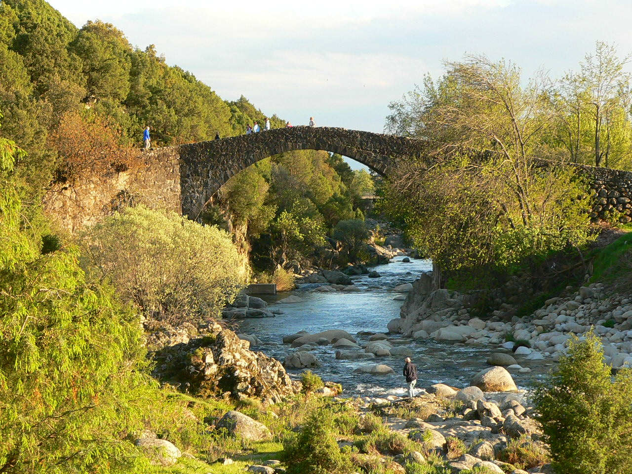 Romanesque bridge at Alardos gorge, between Madrigal de la Vera (CC) and Candeleda (AV), Spain.